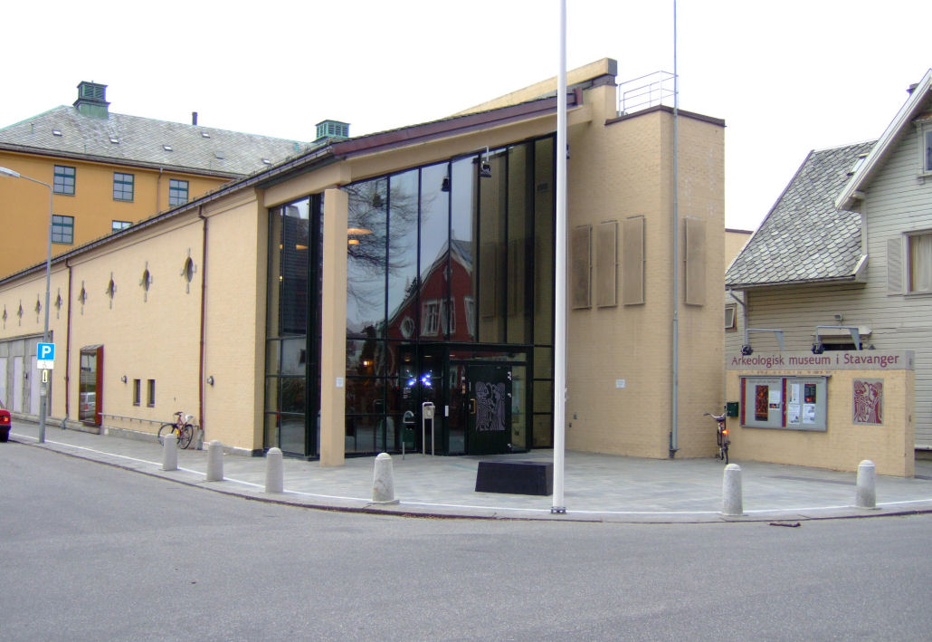 Arkeologisk museum i Stavanger